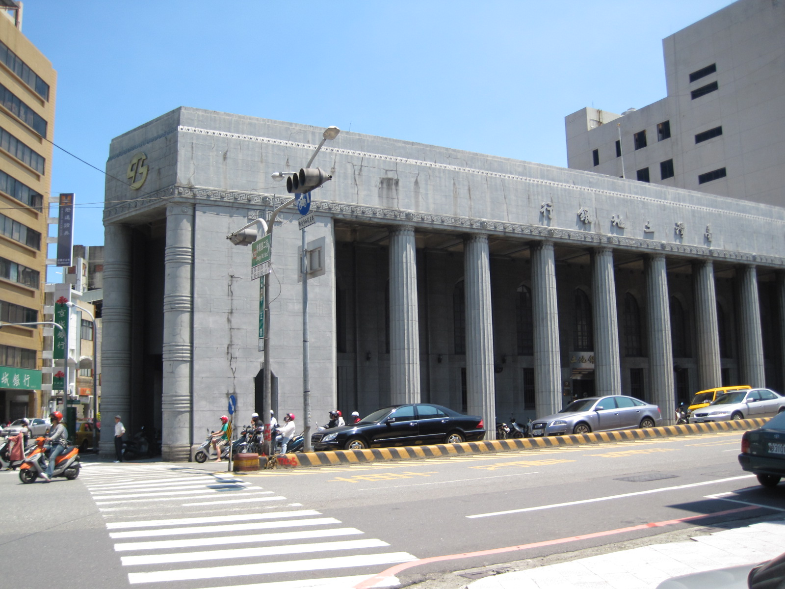 中文（台灣）: 原日本勸業銀行臺南支店，今臺灣土地銀行臺南分行。